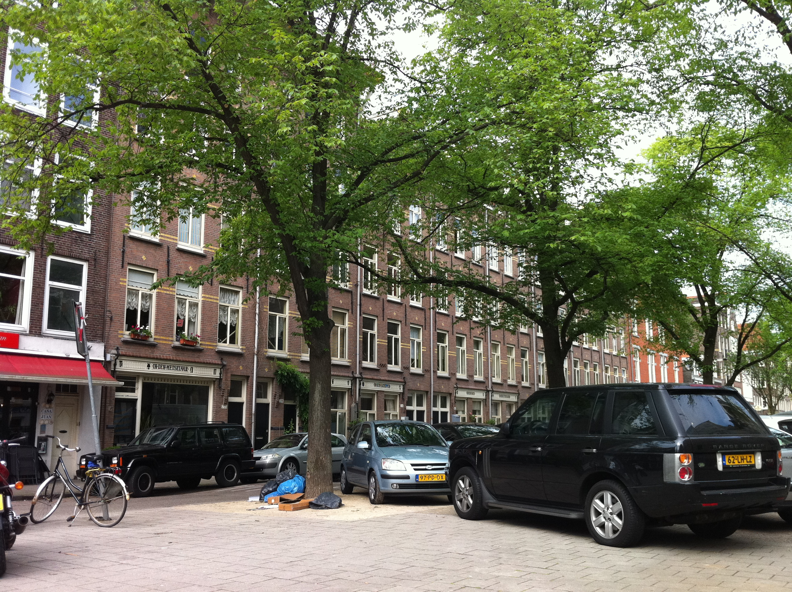 Arbeiderswoningen Lindengracht van de Bouwonderneming Jordaan